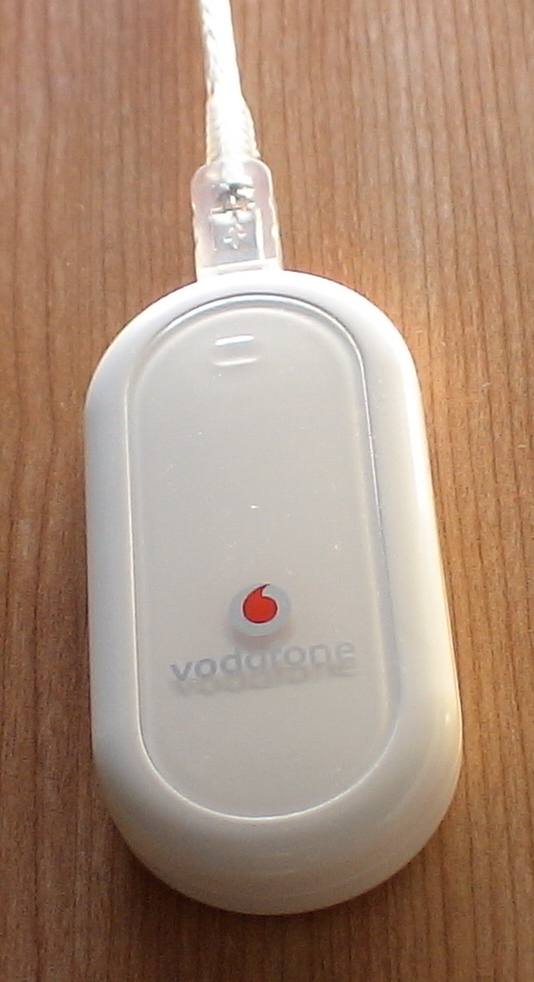 Huawei E220 HSDPA USB Modem Descripción1 Descripción2